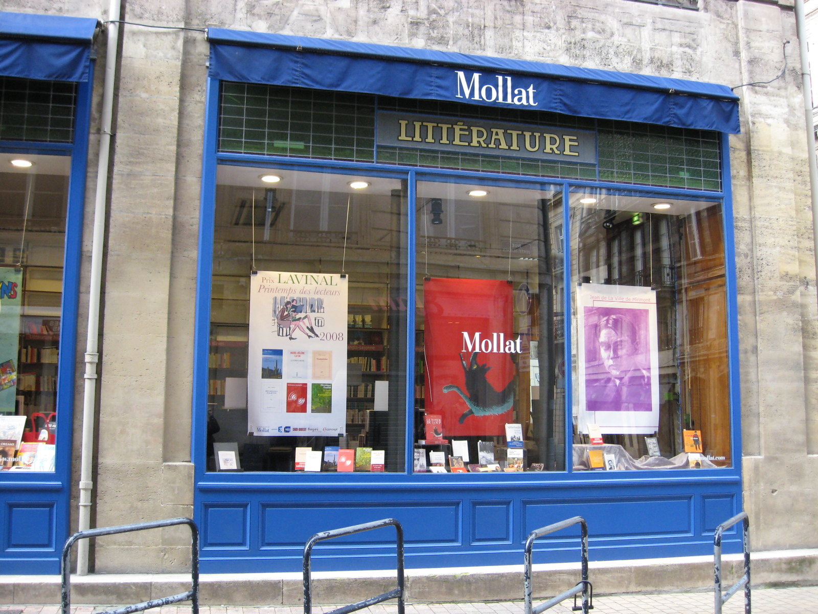 Vitrine Librairie Mollat Bordeaux France